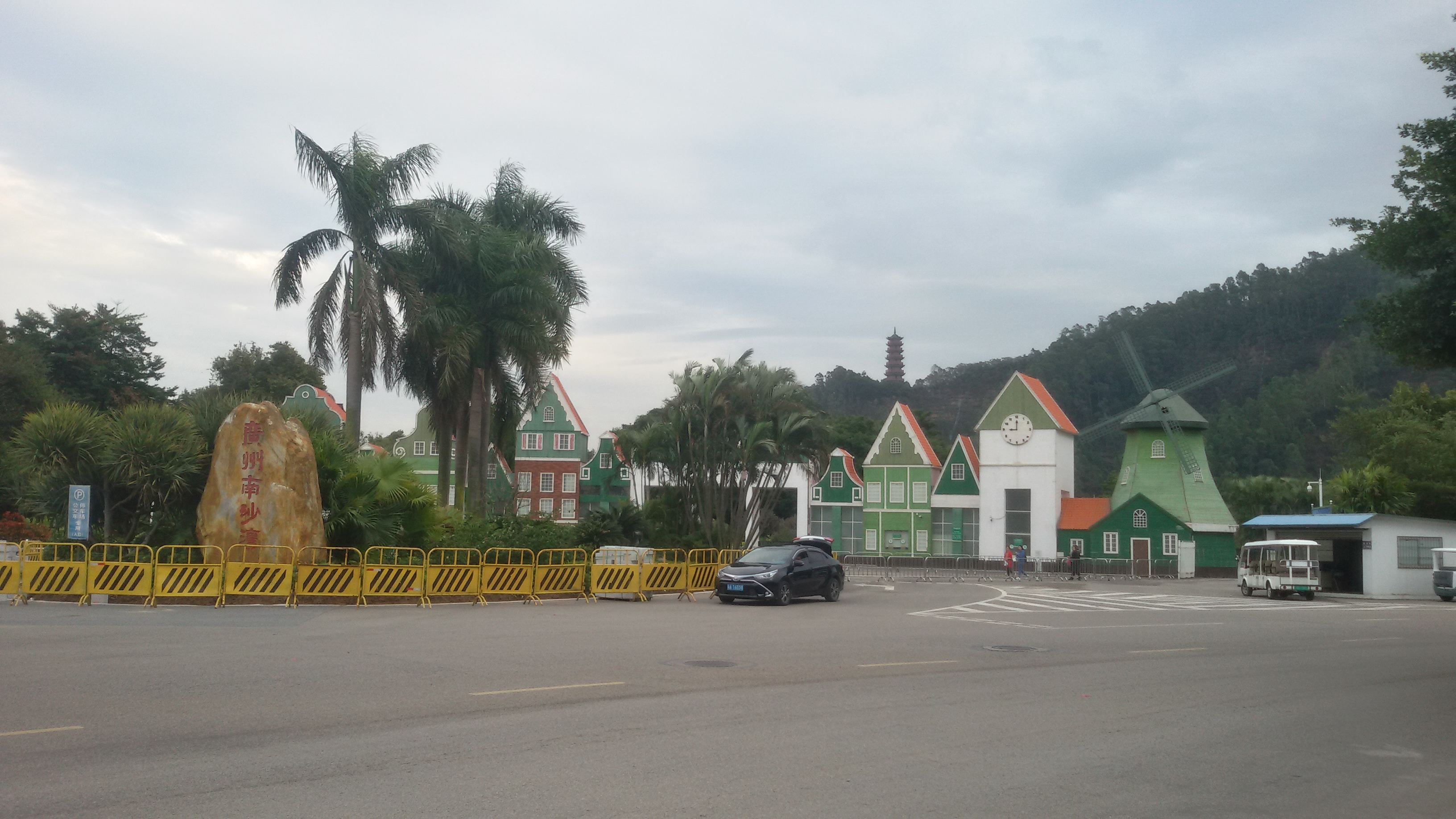 粵語: 廣州南沙灣